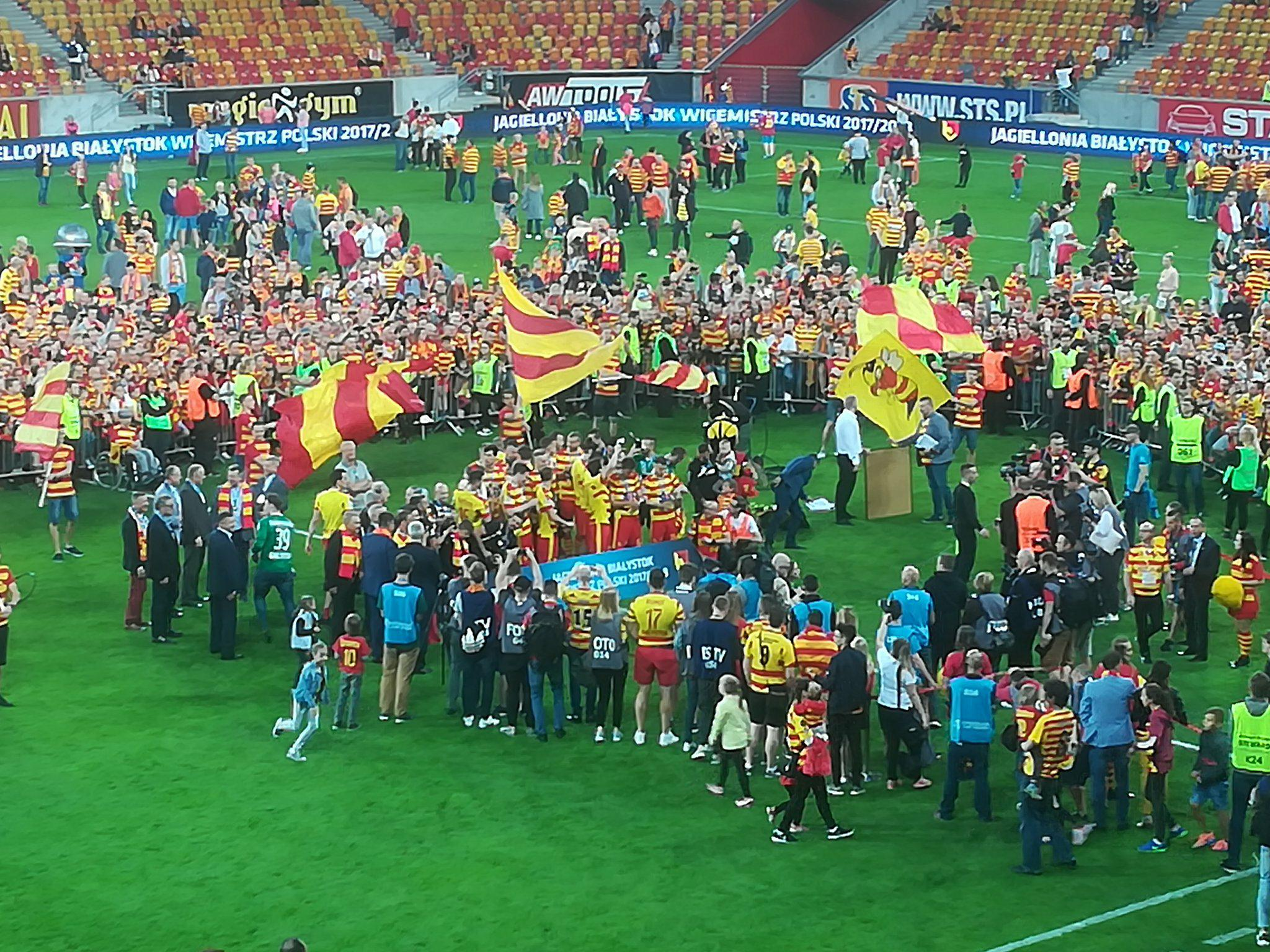 Feta wicemistrzostwo Polski